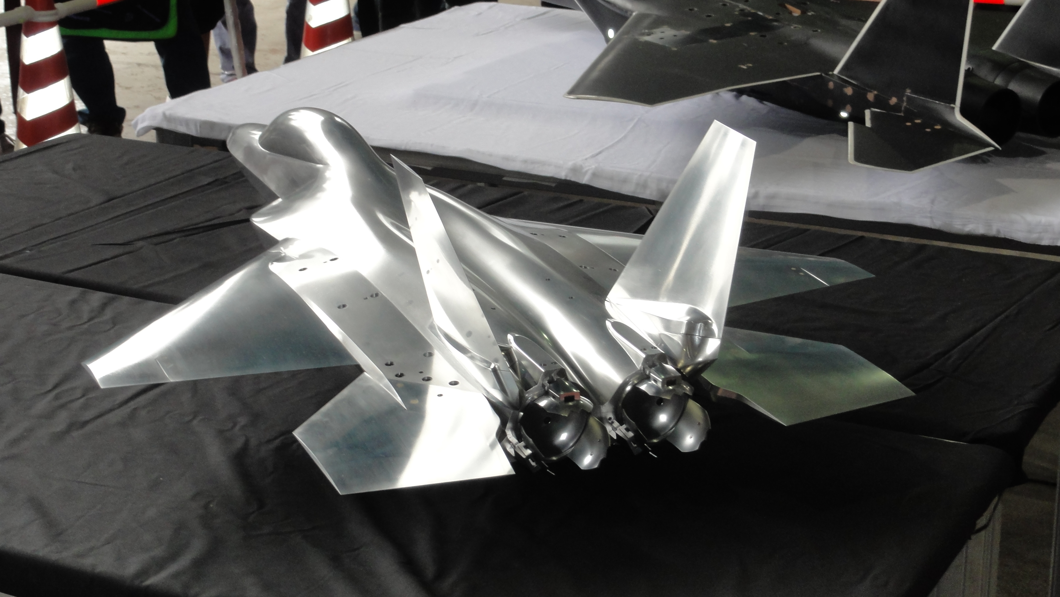 先進技術実証機（ATD-X）風洞試験用1/10スケールモデル、2012年10月28日 航空自衛隊岐阜基地にて。